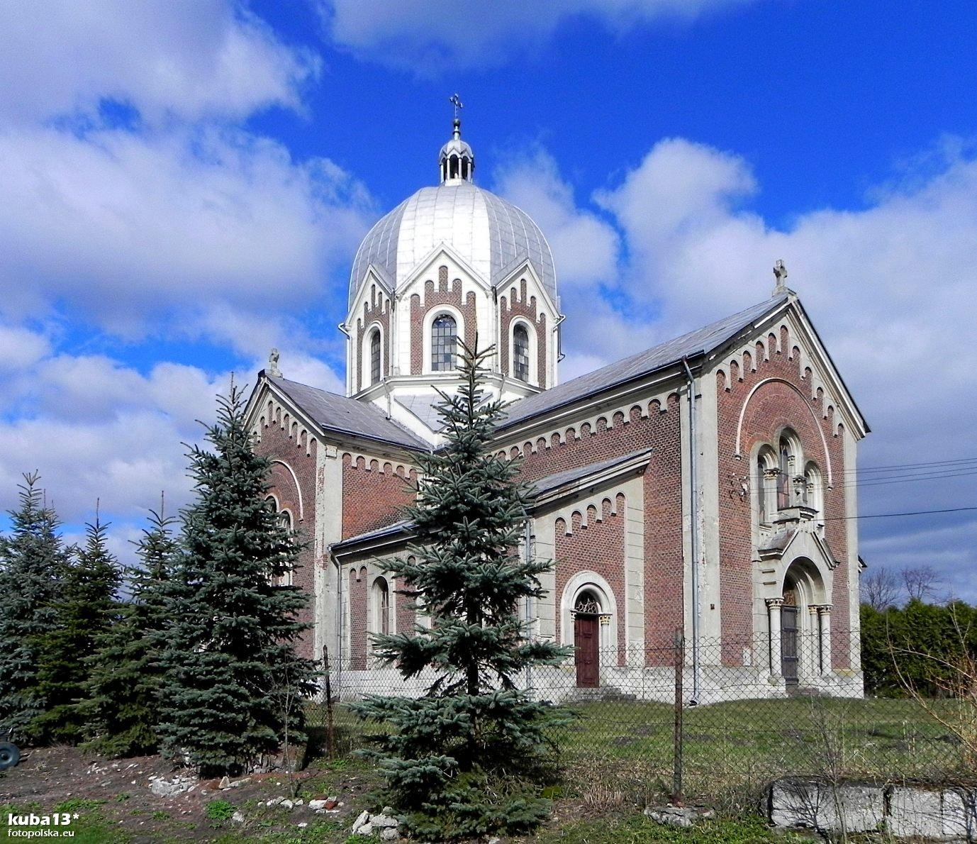 Nowy Lubliniec - dawna cerkiew Przemienienia Pańskiego, obecnie kościół katolicki.